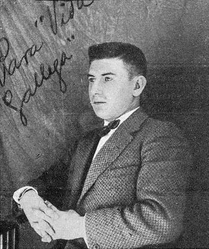 Ricardo Carballo Calero, fotografía en Vida Gallega 1928